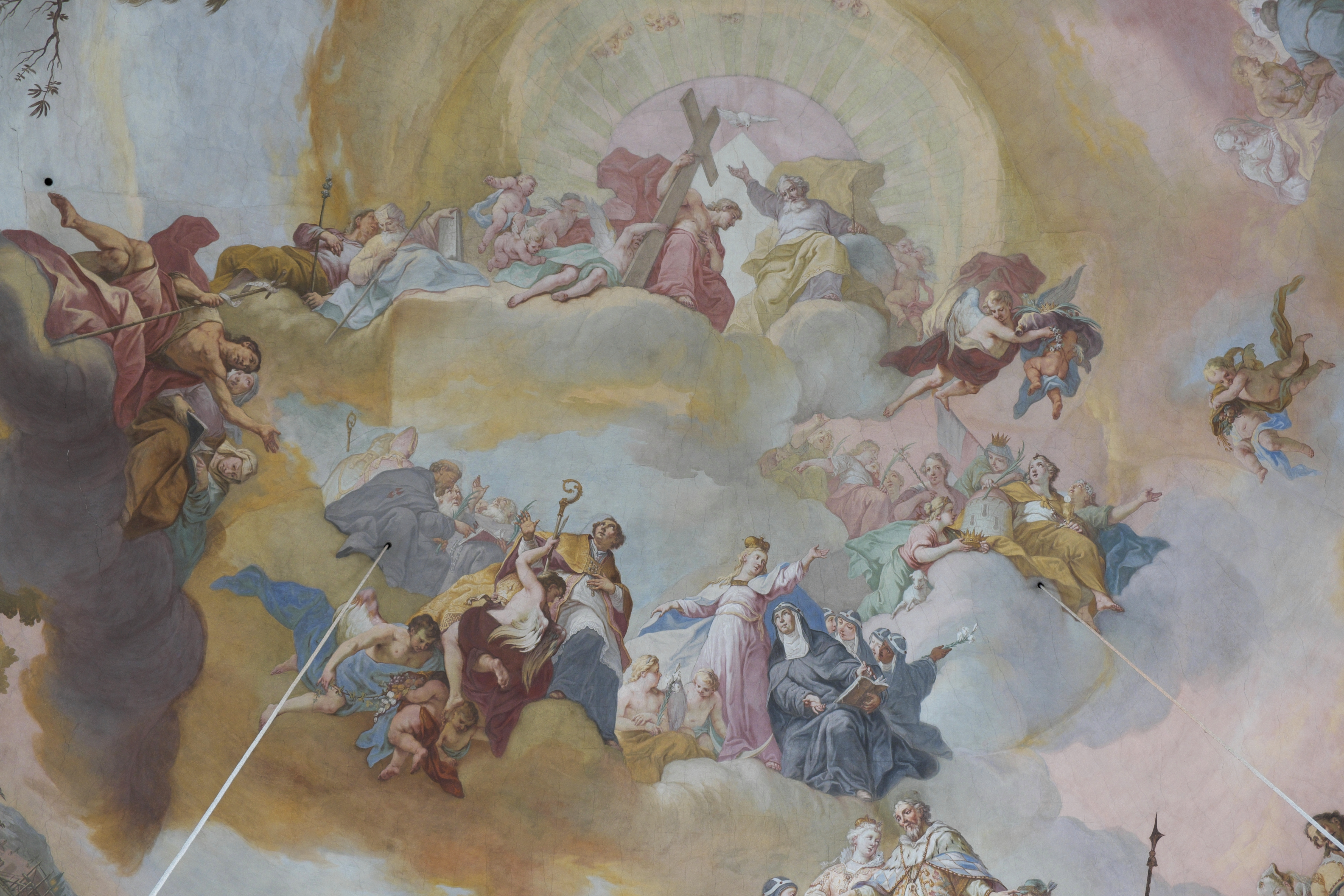 Katholische Pfarr- und Klosterkirche St. Alto und St. Birgitta in Altomünster im Landkreis Dachau (Bayern), Kuppelfresko (signiert 1767) von Joseph Mages (1728–1769), Darstellung (Ausschnitt): Hl. Alto und hl. Richard Reynolds (links), hl. Brigitta mit anderen Heiligen unter dem Schutzmantel Marias (rechts), oben: Heilige Dreifaltigkeit